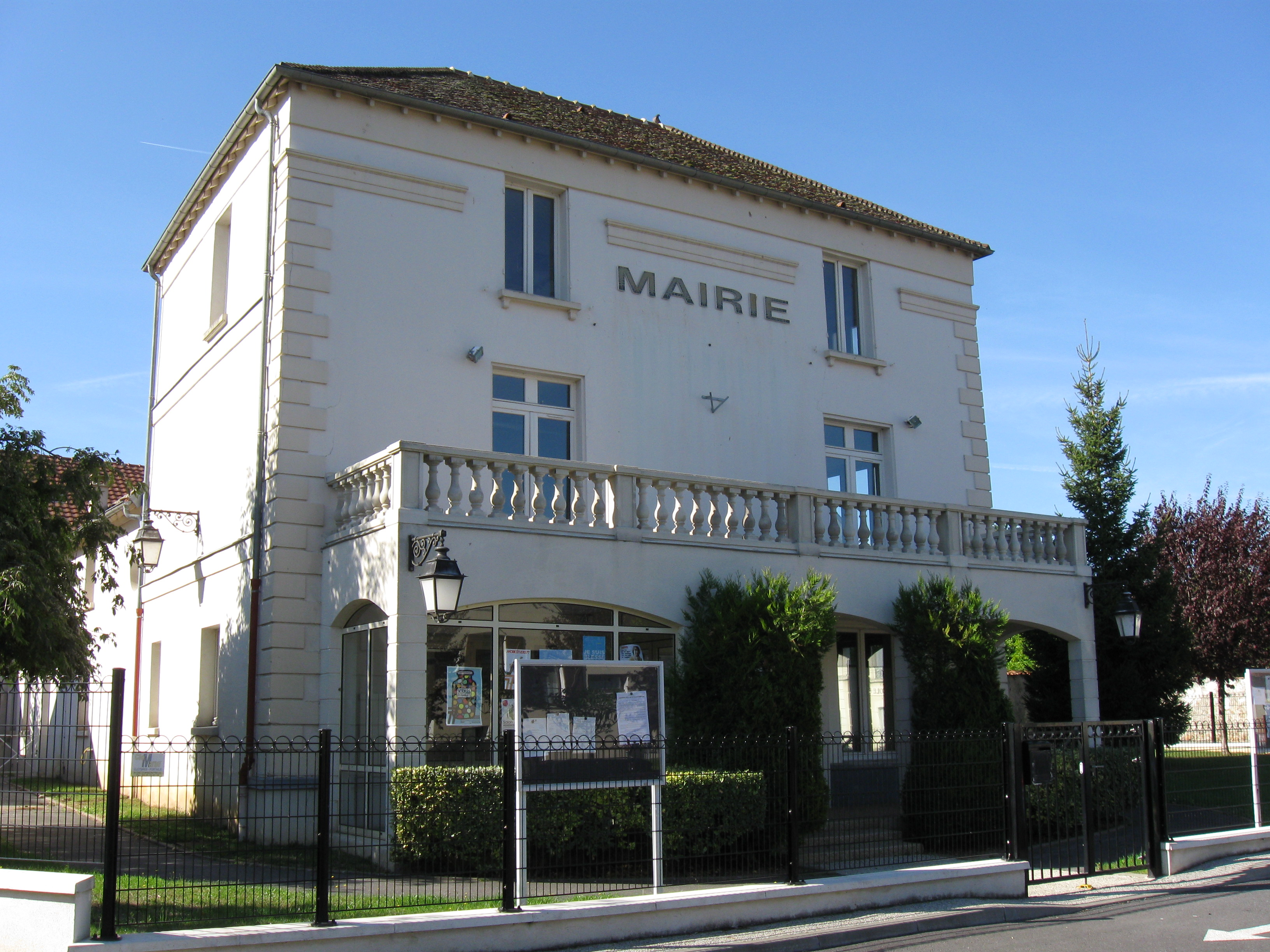 Mairie de Luzancy. (département de la Seine et Marne, région Île-de-France).